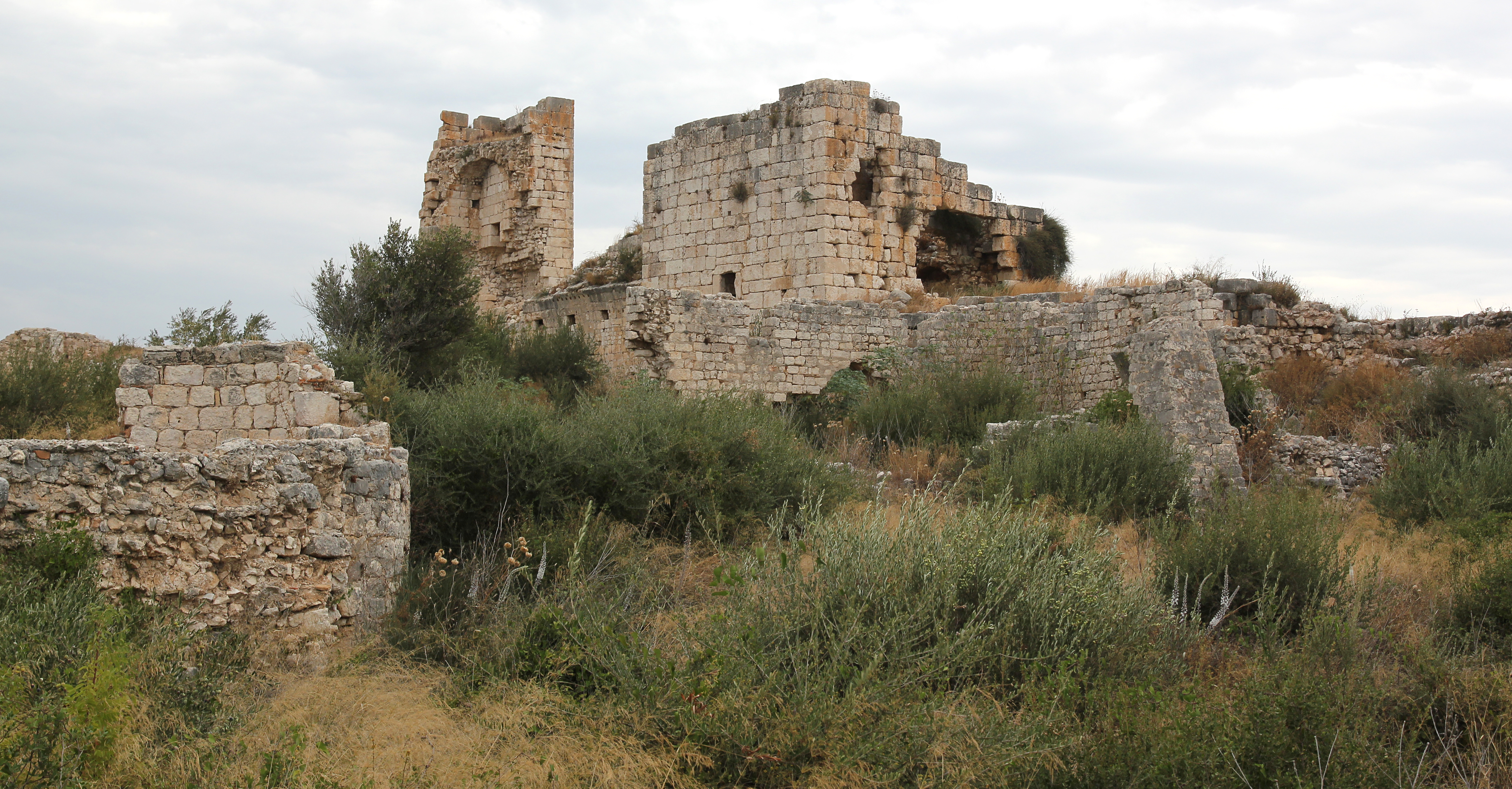 Korykos, Landburg bei Kızkalesi, Südtürkei, Hauptburg von Westen